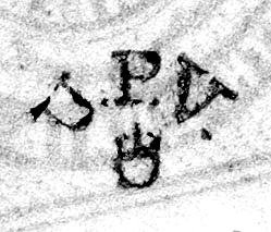 Экспертный знак Союза филателистов Украины